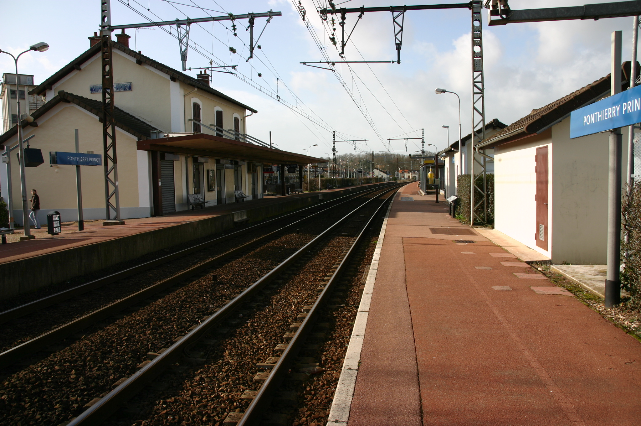 La gare de Ponthierry - Pringy, Saint-Fargeau-Ponthierry, département de la Seine-et-Marne (France)